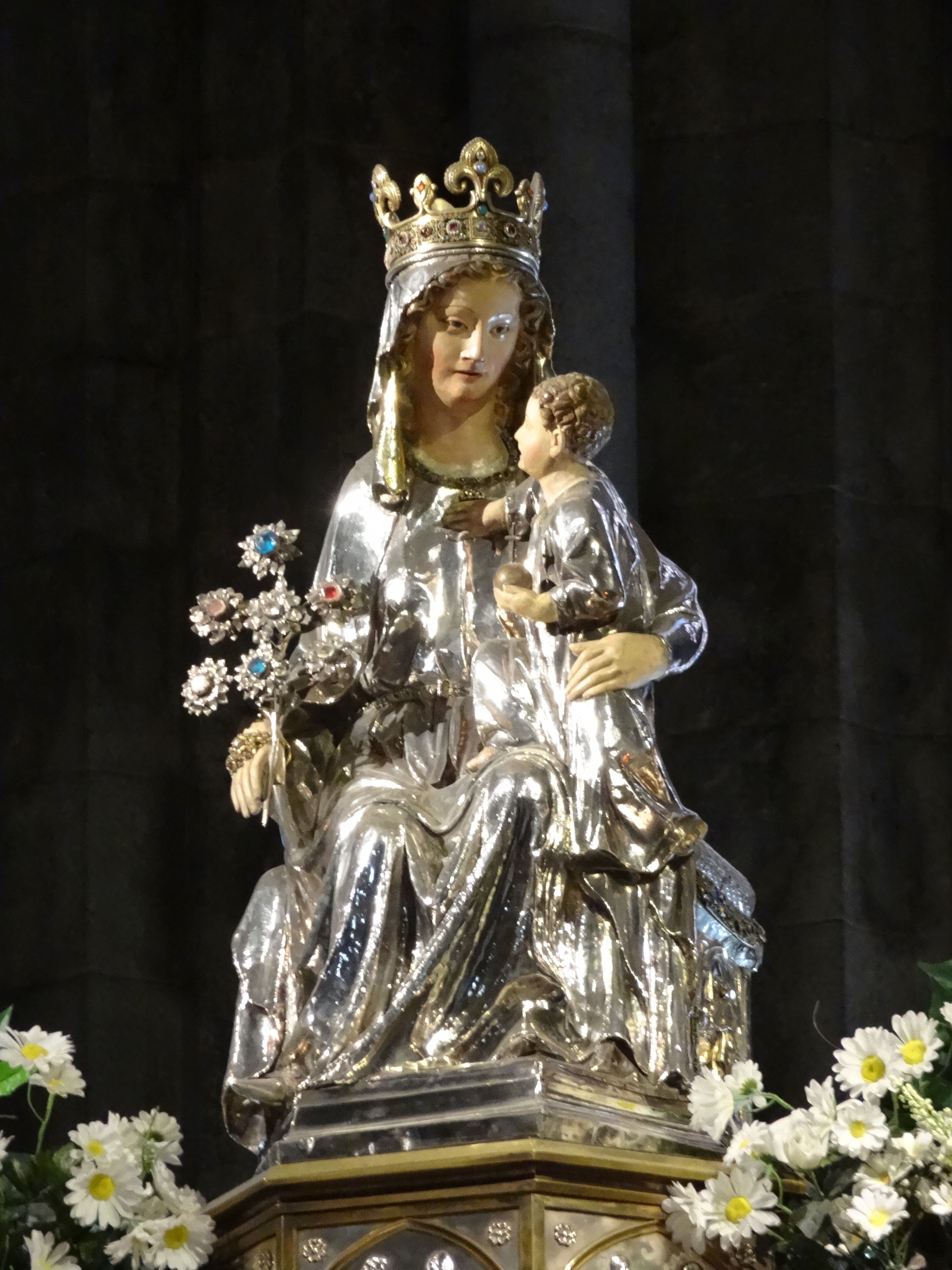 Escultura de Sta. María a la Iglesia colegiata de Santa María (Roncesvalles)